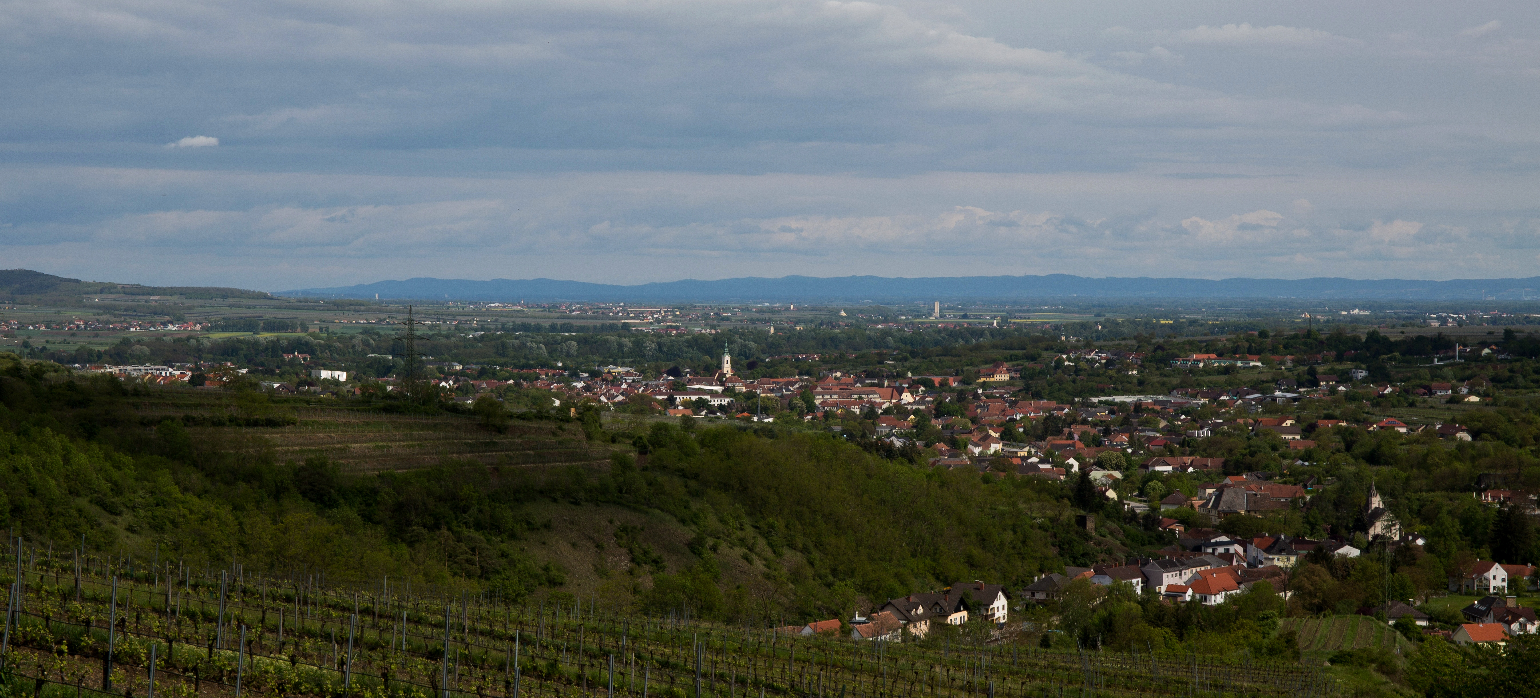 Langenlois von Westen aus gesehen Langenlois